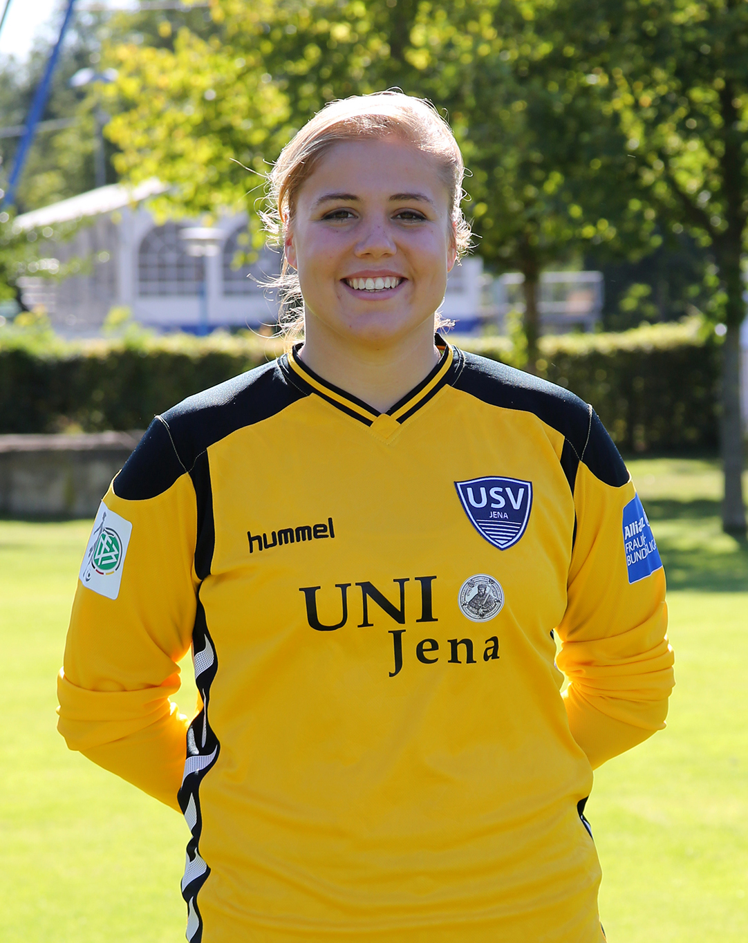 Justien Odeurs bei der Teamvostellung des FF USV jena